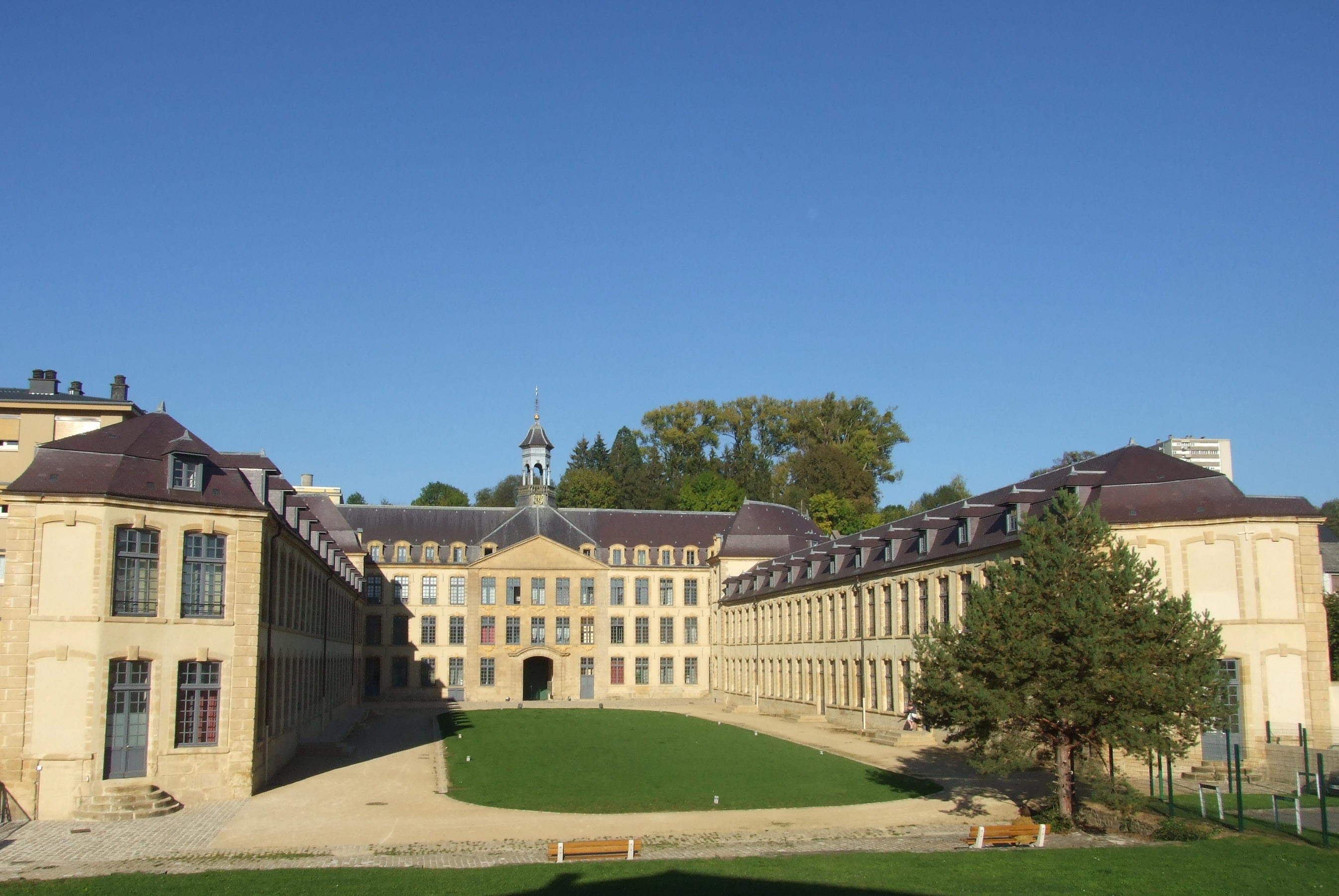 ancienne manufacture des draps